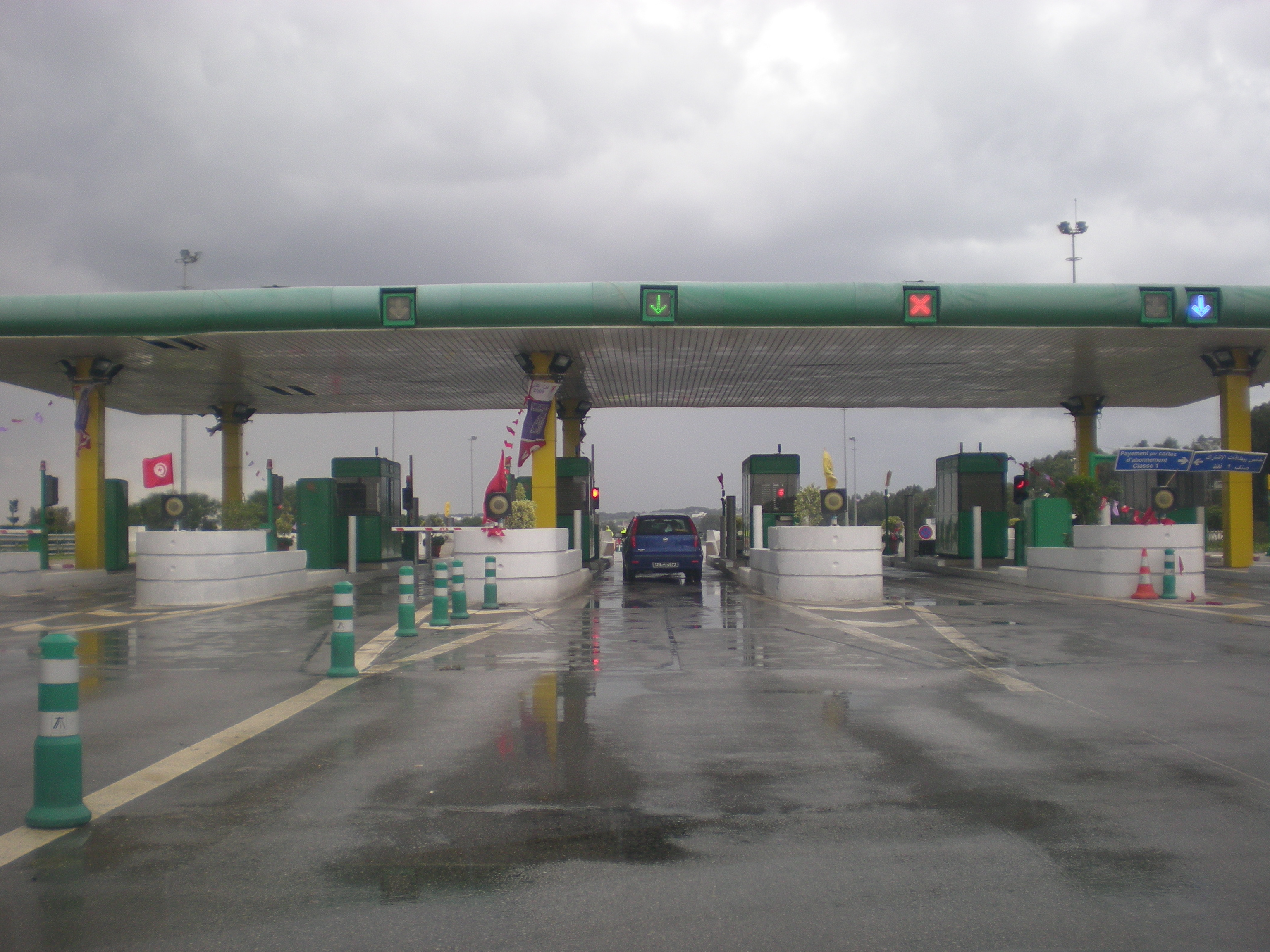 Gare de péage Menzel Jemil, pour desservir Bizerte, sur l'autoroute A4, Tunisie